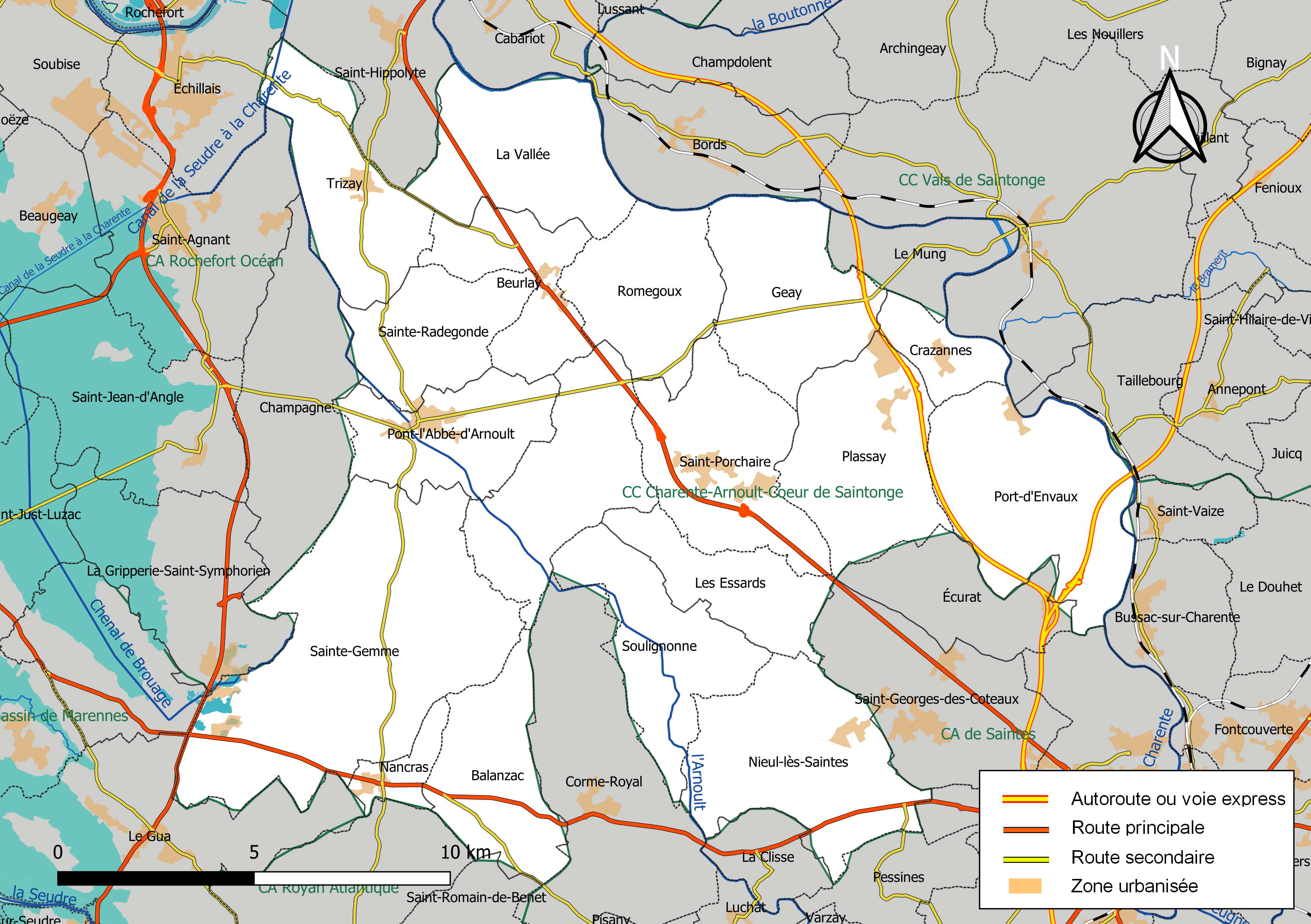 Carte géographique de la Communauté de communes Charente-Arnoult-Cœur de Saintonge, département de la Charente-Maritime, France. Composition au 1er janvier 2019.